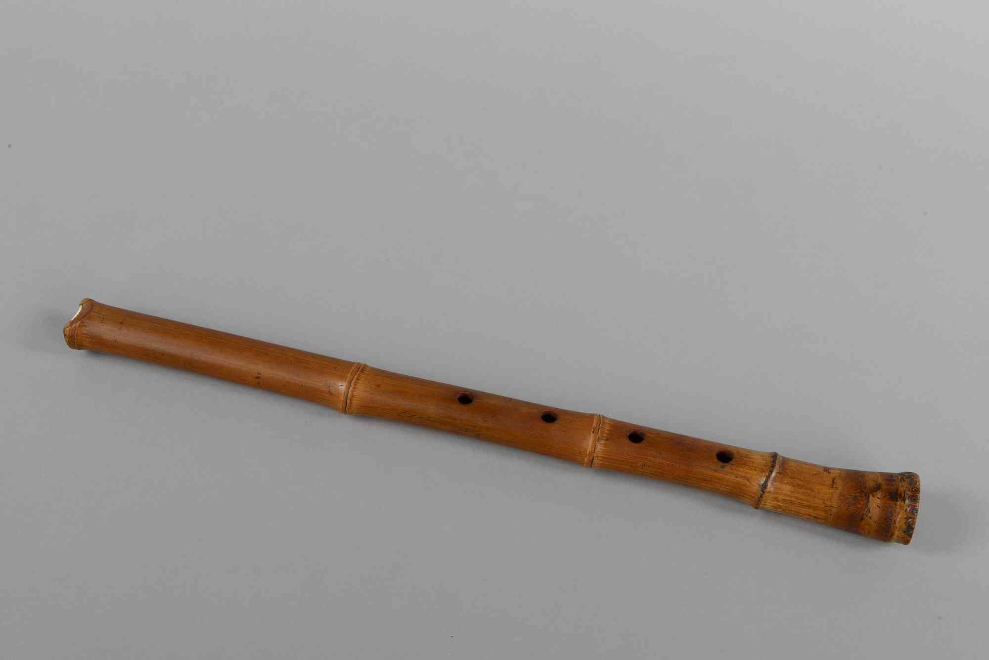 Flet shakuhachi